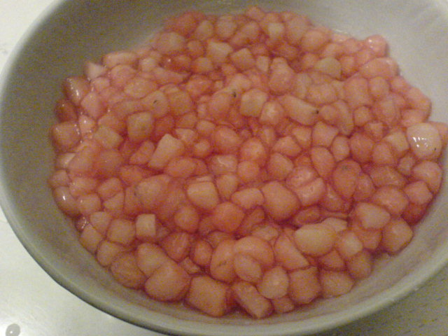 ทับทิมกรอบ (dessert)